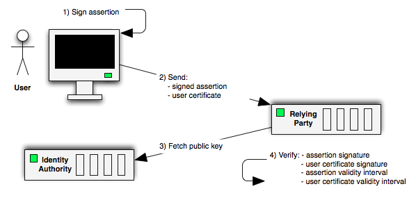 Генерация и верификация утверждения в протоколе BrowserID